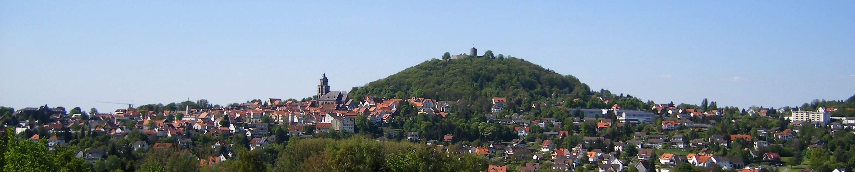 Homberg im Mai 2008